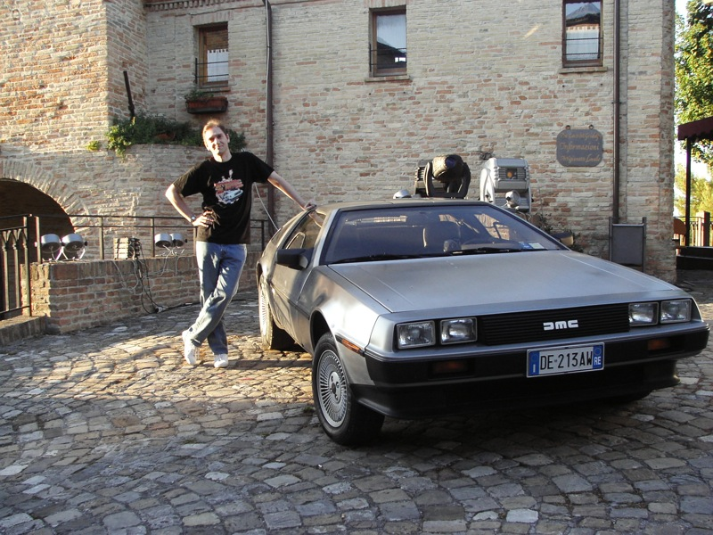 Paolo Attivissimo and De Lorean DMC-12